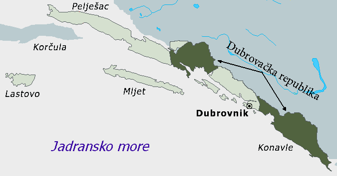 Мапа Дубровачке републике 1991-1992, територија под контролом ЈНА (тамно зелена) и контролом ХВ (светло зелена).